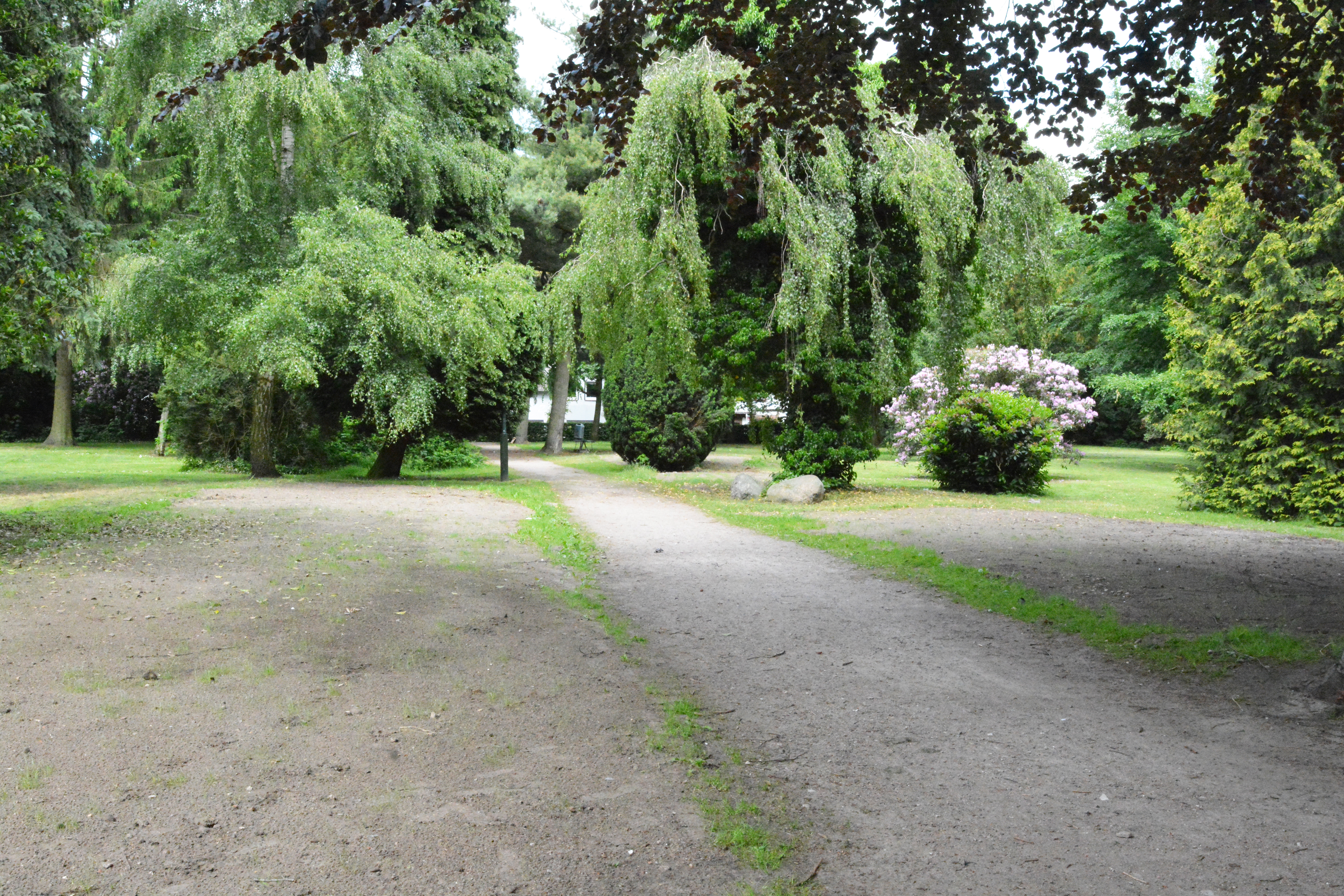 Einer der Hauptwege im Cäcilie-Bleeker-Park, nach der Emfernung der historischen Grabsteine in Uetersen